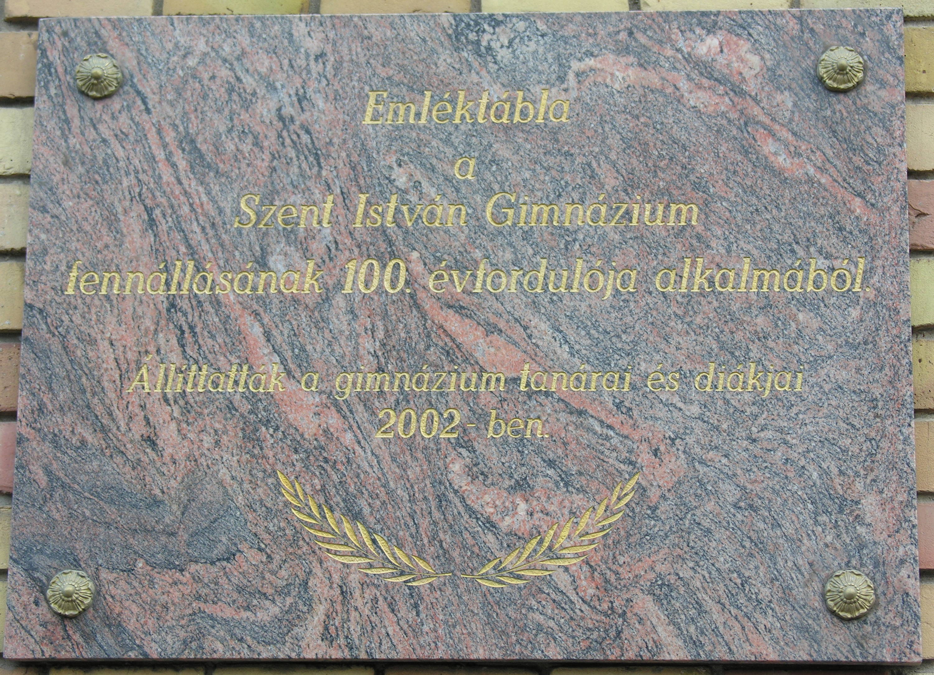 Szent István Gimnázium 100 éves emléktábla, Budapest, XIV., Ajtósi Dürer sor 15-17.